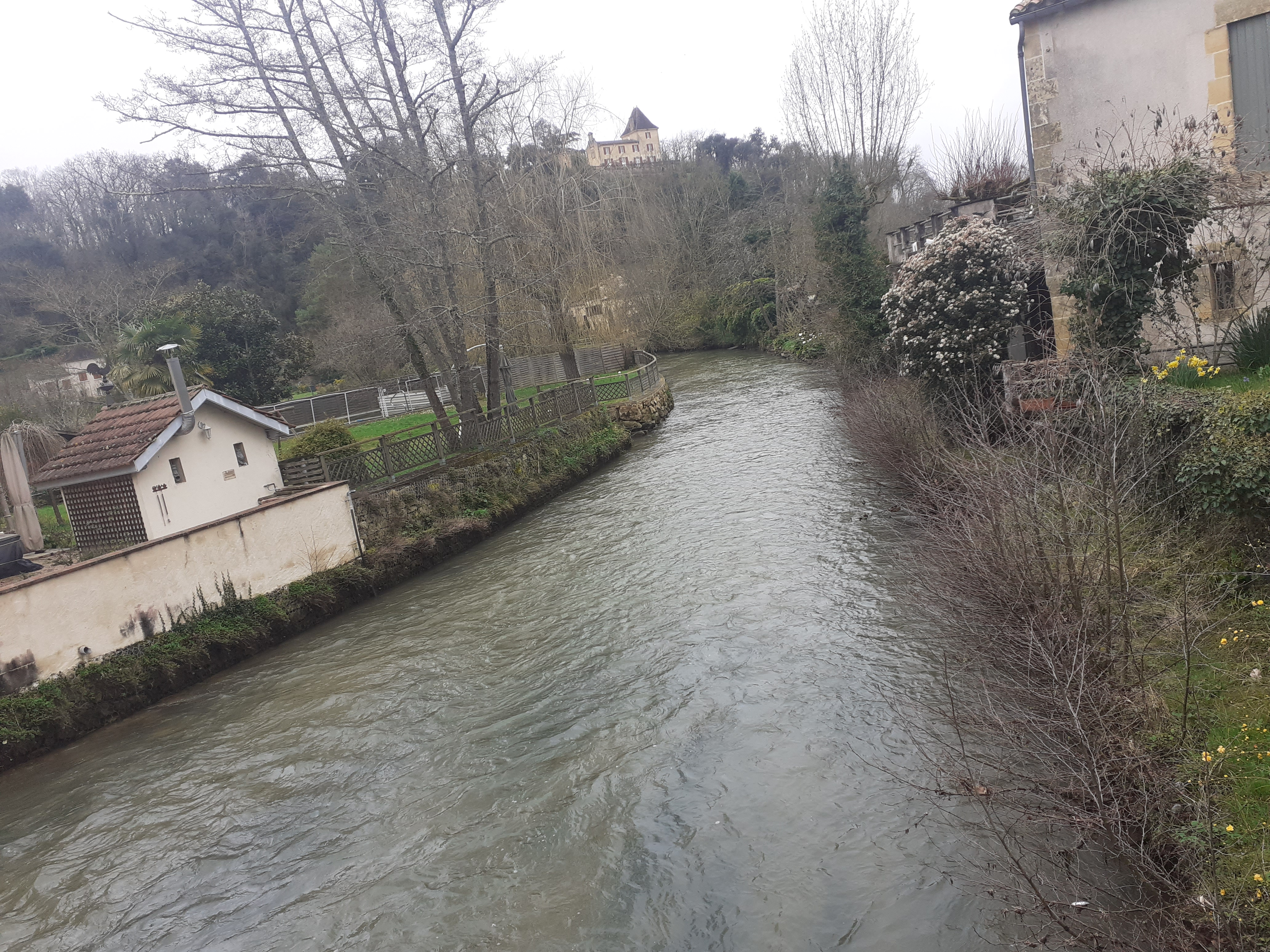 Photo de la Couze en Hiver